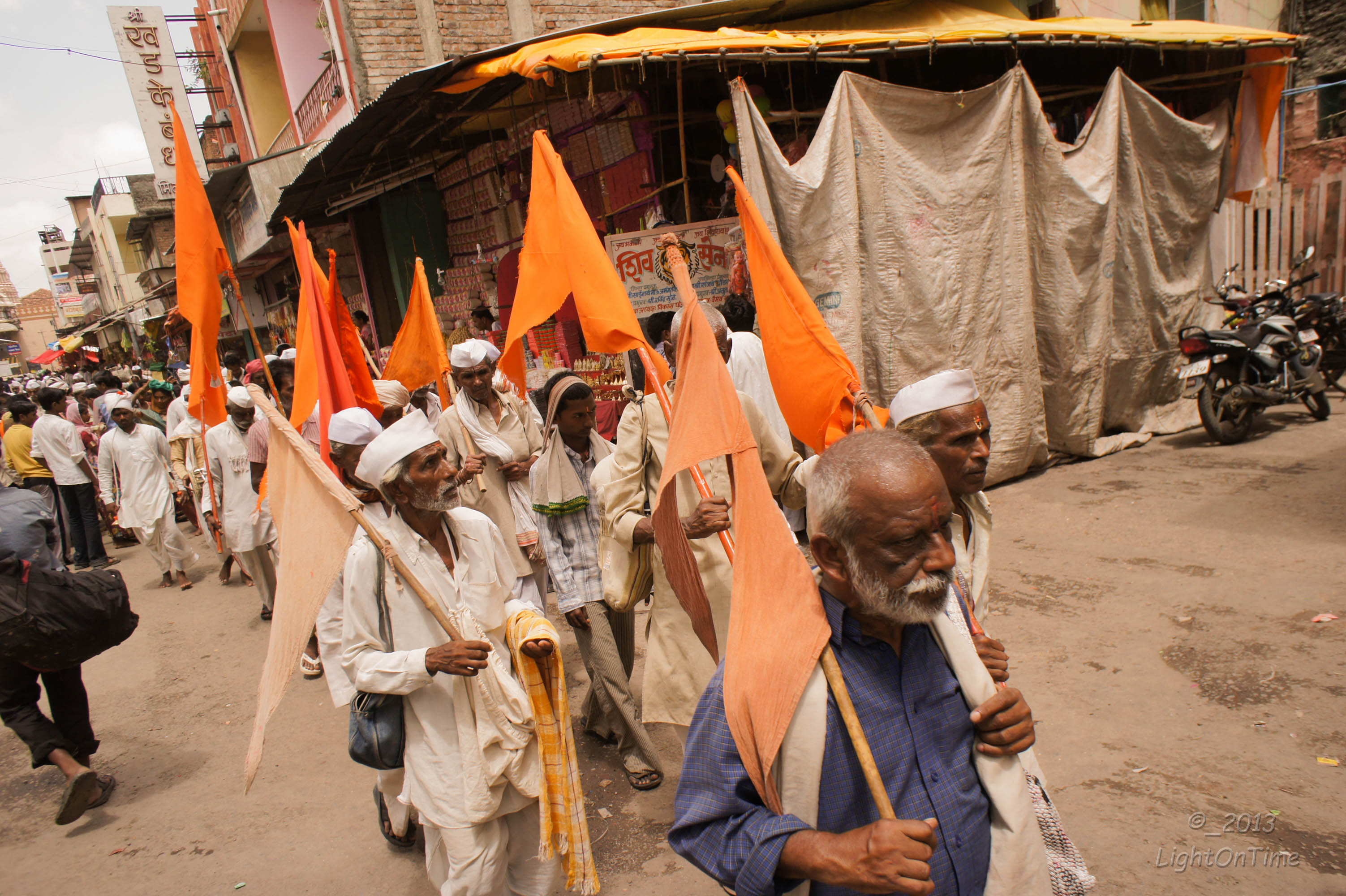 Pundlik Nagar, Pandharpur, Maharashtra 413304, India